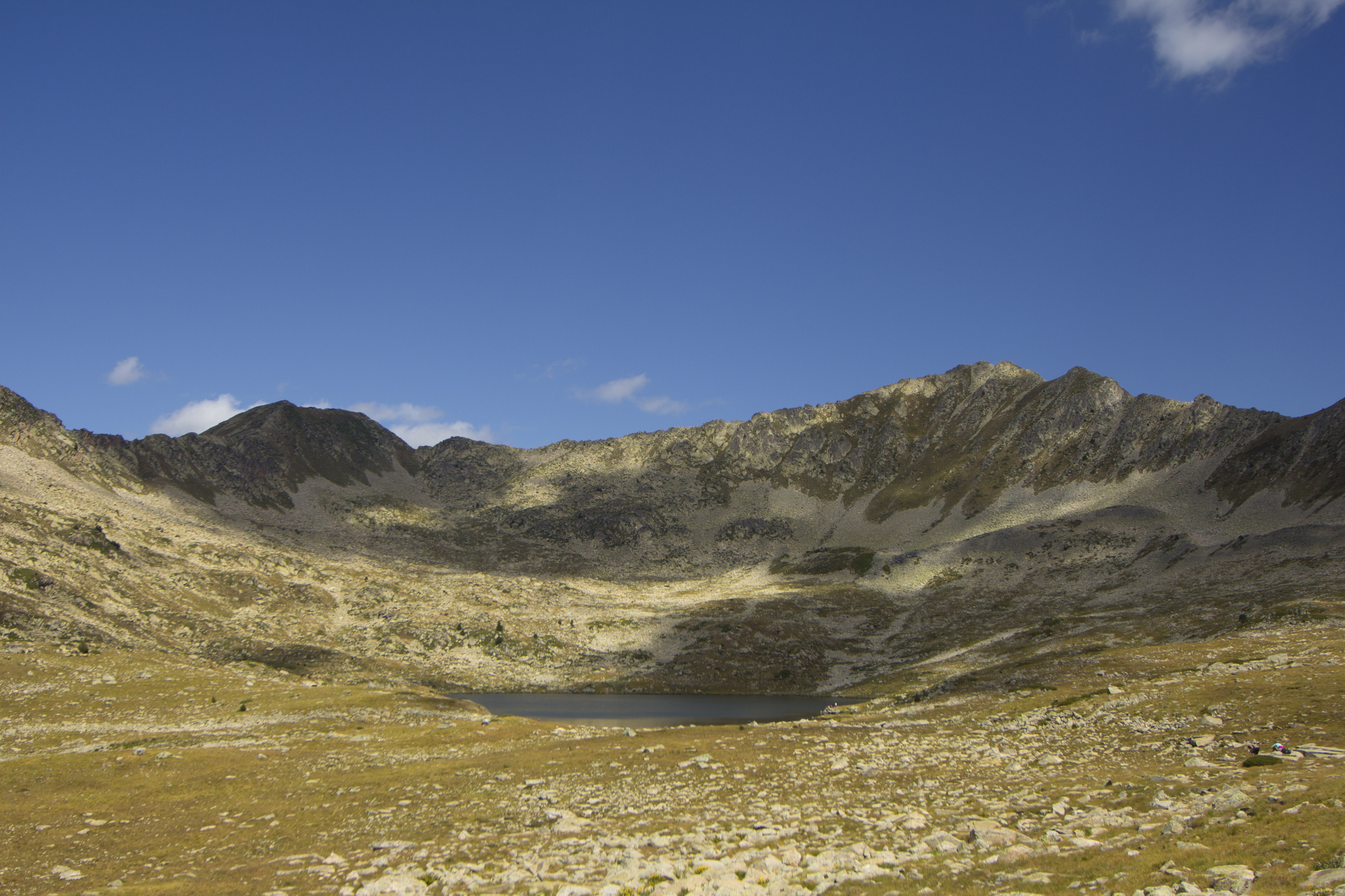 Cap de Marimanha i Pic de Marimanya, circ de Baciver (Vall d'Aran i Pallars Sobirà)